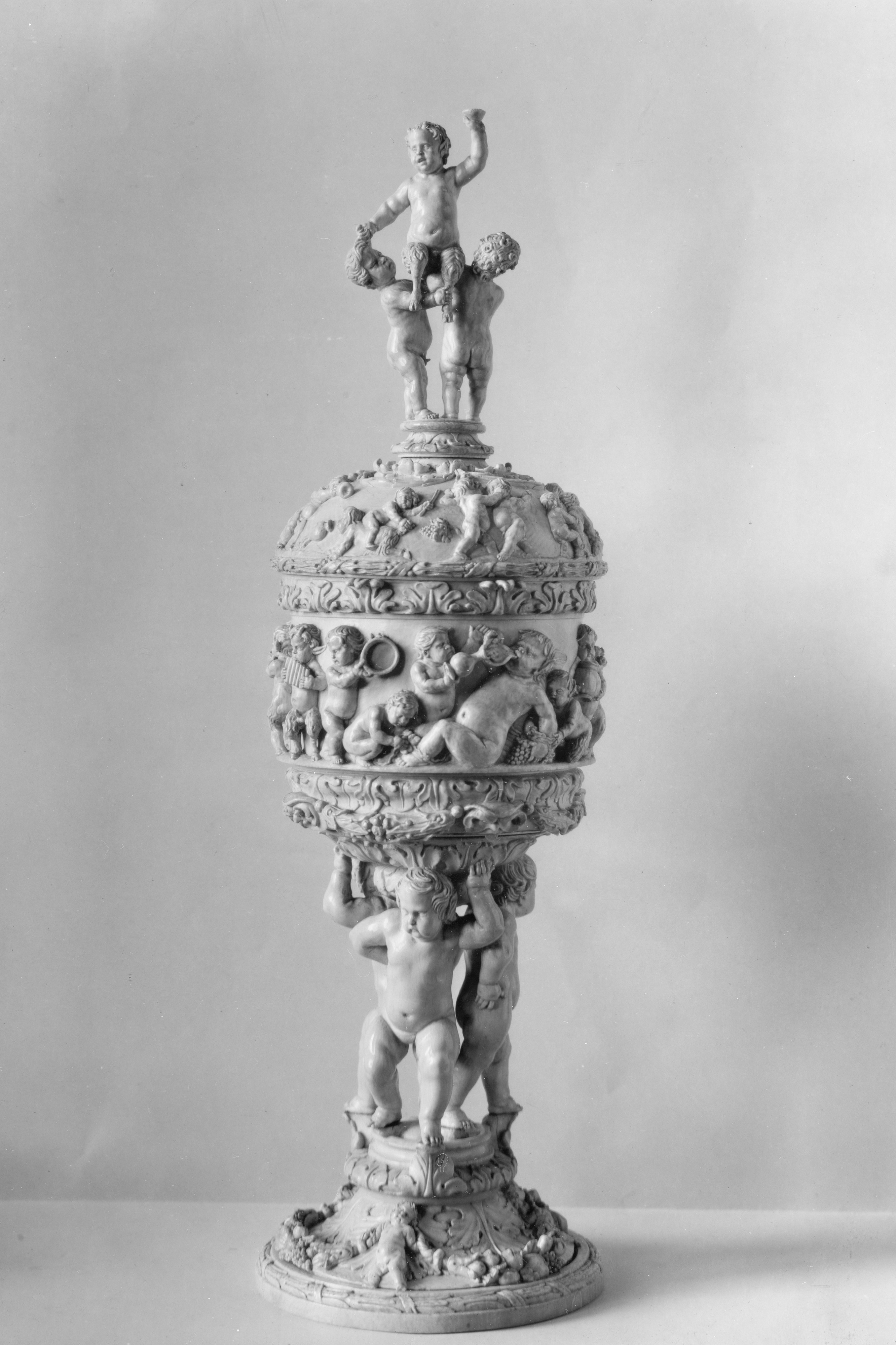 Flemish; Cup; Sculpture-Miniature